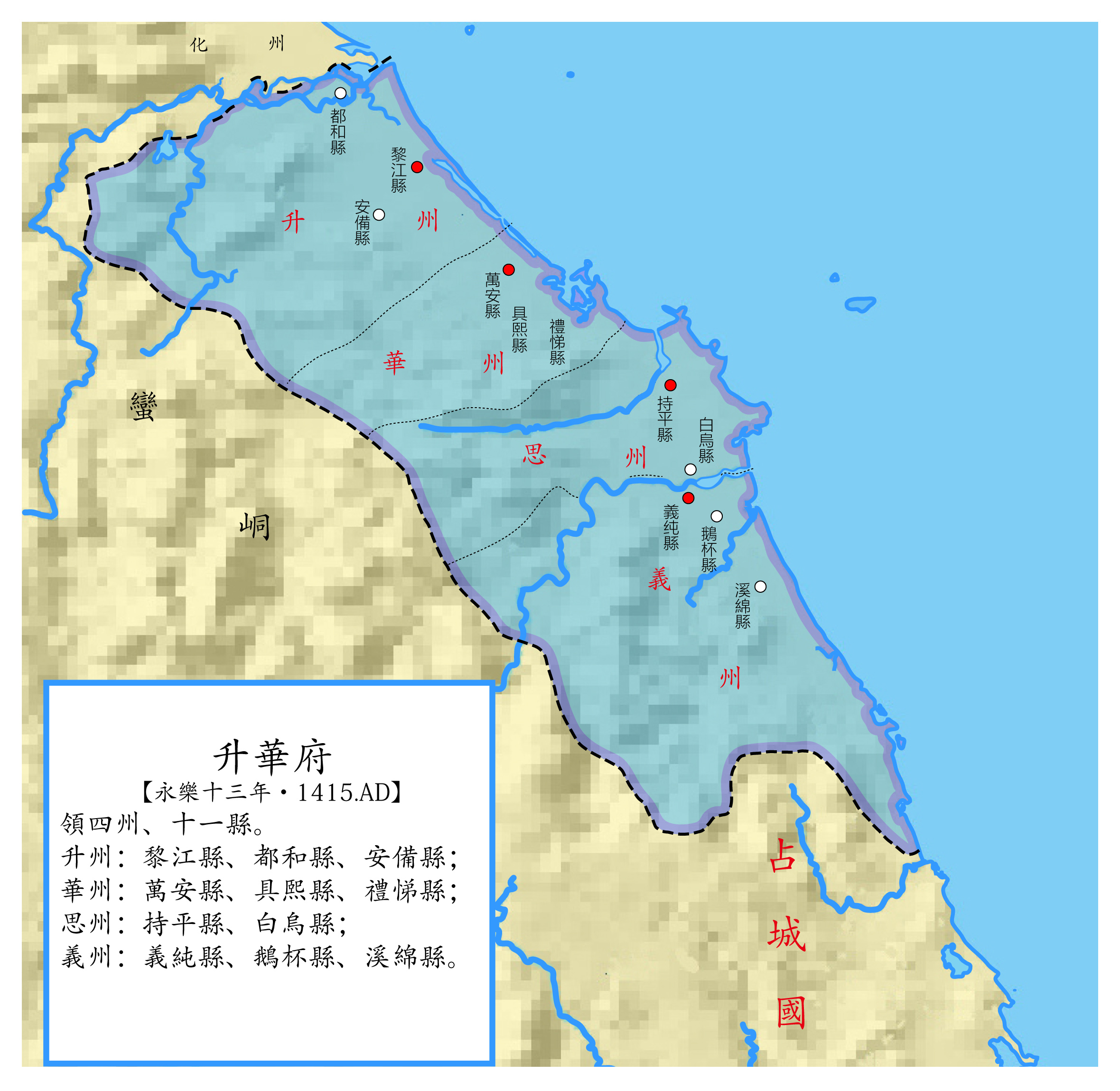 升华府